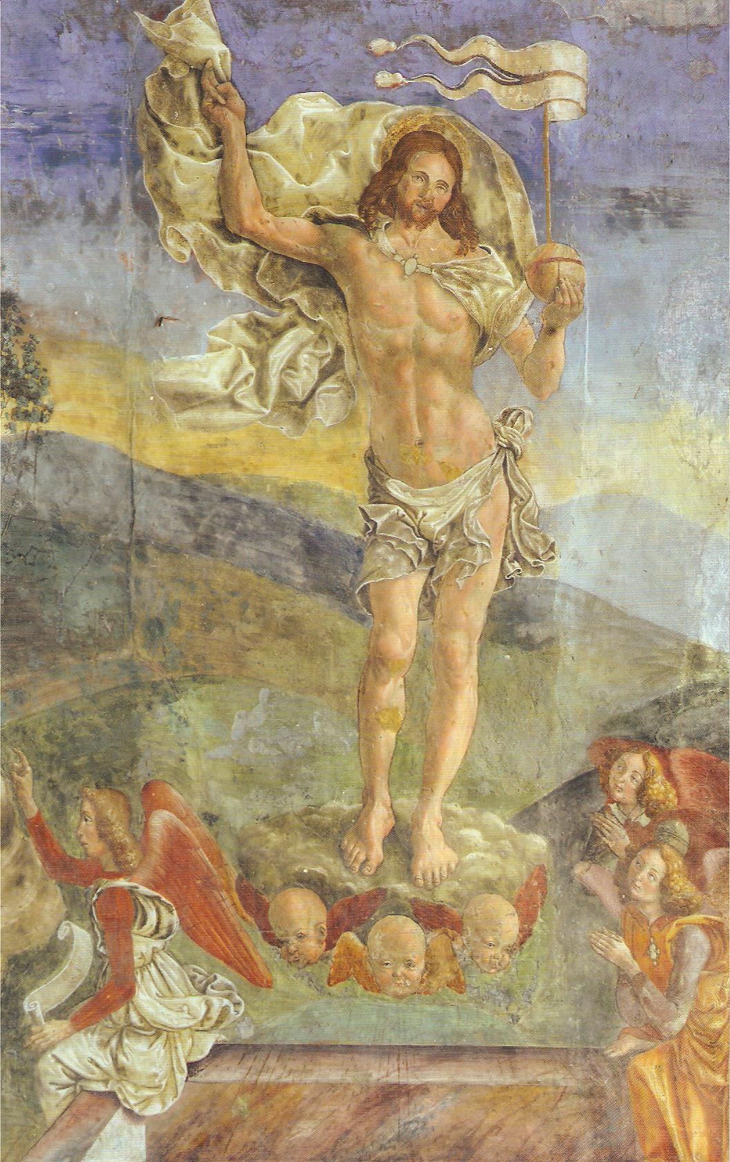 detail